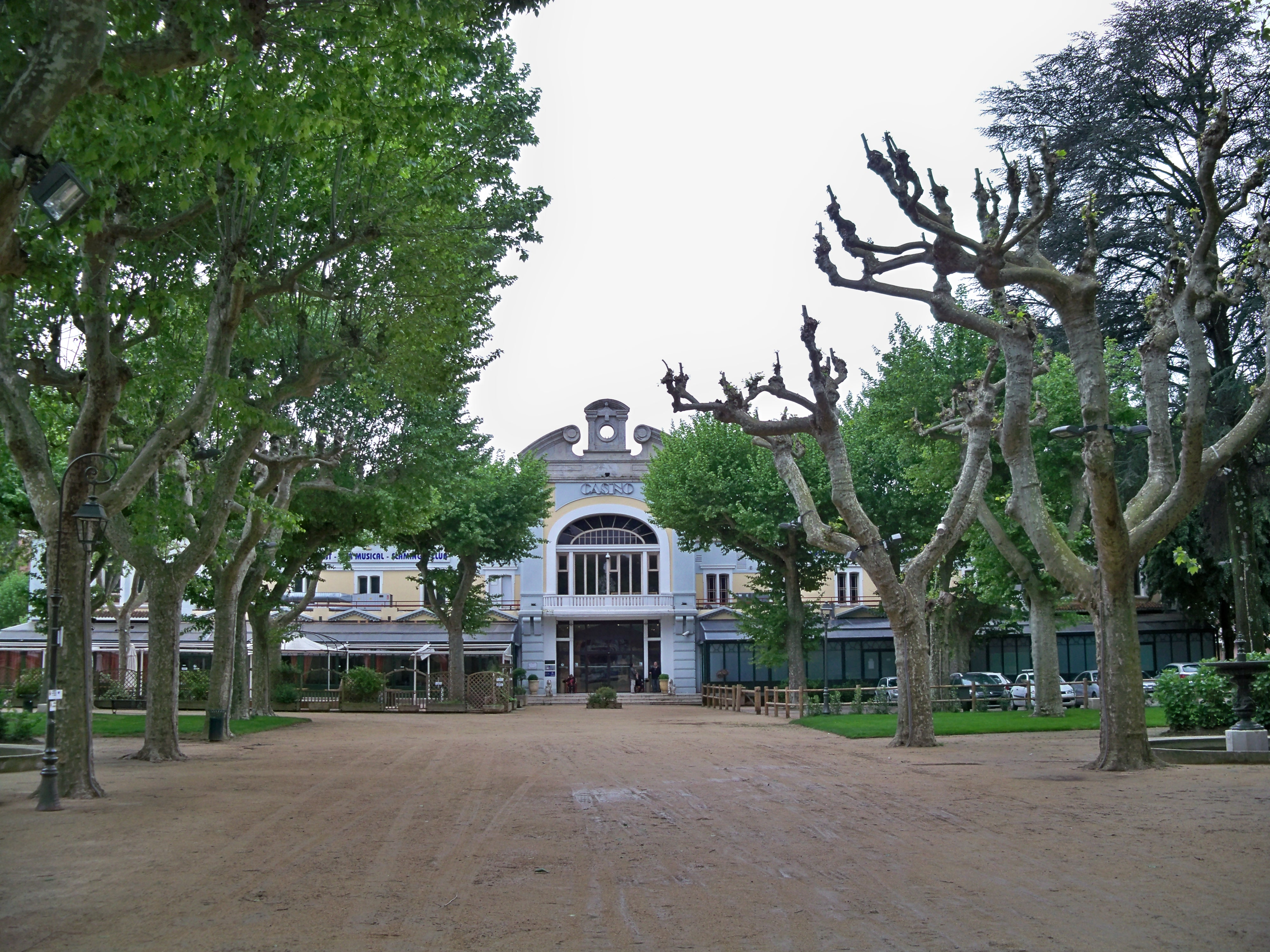 Casino de Vals-les-Bains, coté jardin